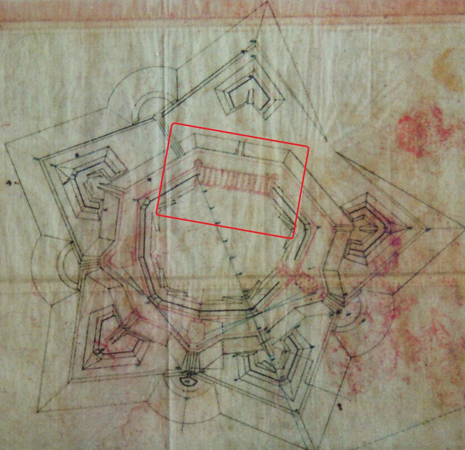 Johanneshovs skans, Stockholm, ritning (norr uppåt). Den fullbordade delen "slutvärnet" inom röd ram.